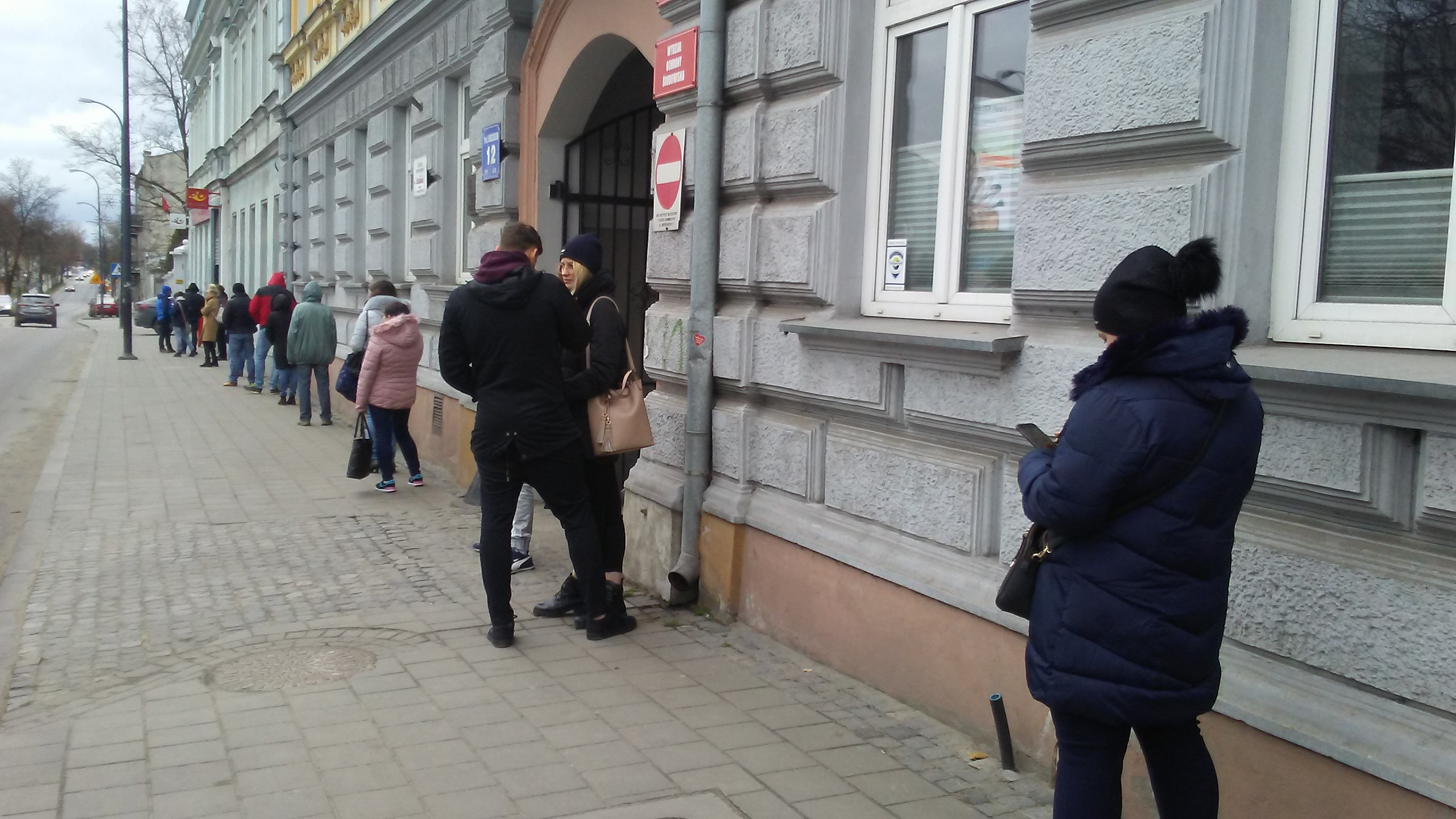 Kolejka oczekujących przed Pocztą Główną w Tomaszowie Mazowieckim po wprowadzeniu przez narodowego operatora limitów obecności w urzędach